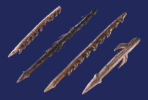 Reproduction autorisée